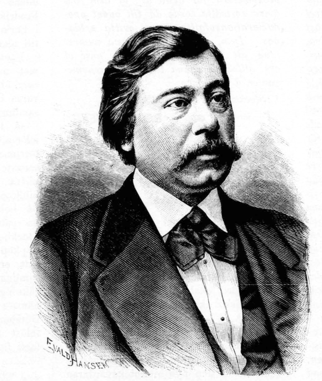 Joseph Dente (1838-1905)